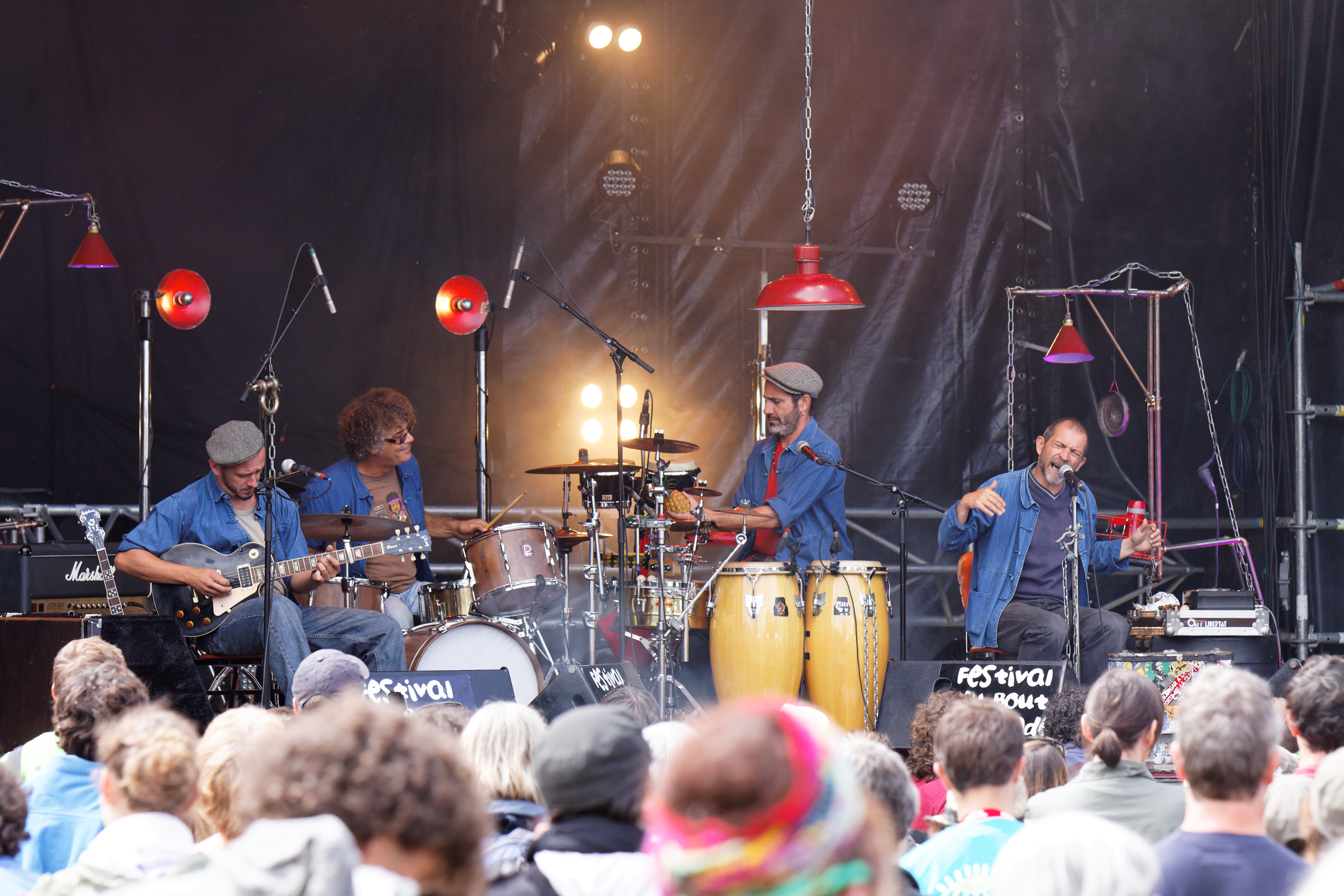 Moussu T e lei Jovents en concert sur la scène Kermarrec lors du festival du bout du Monde à Crozon dans le Finistère (France).